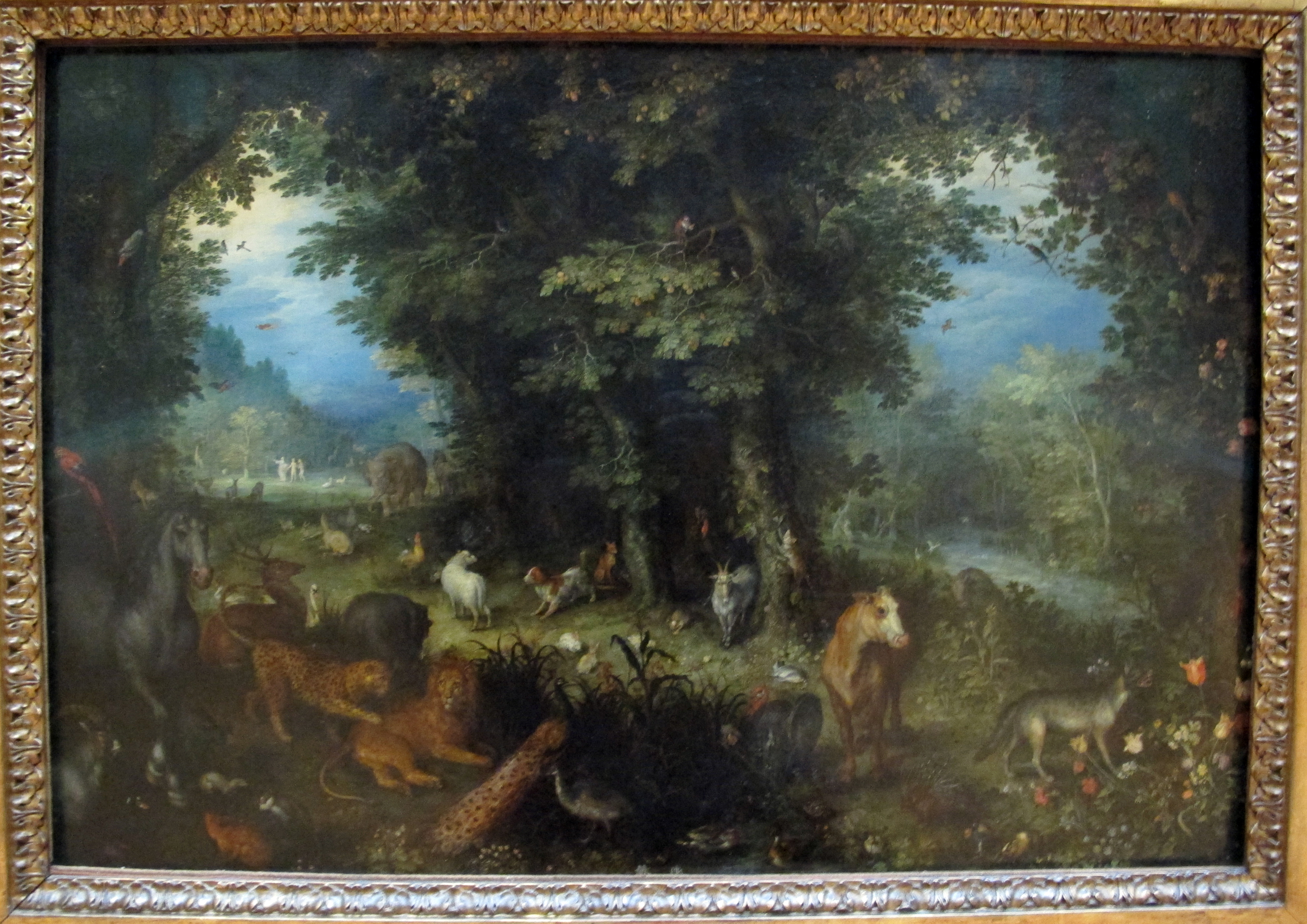 Louvre, pittura fiamminga e olandese